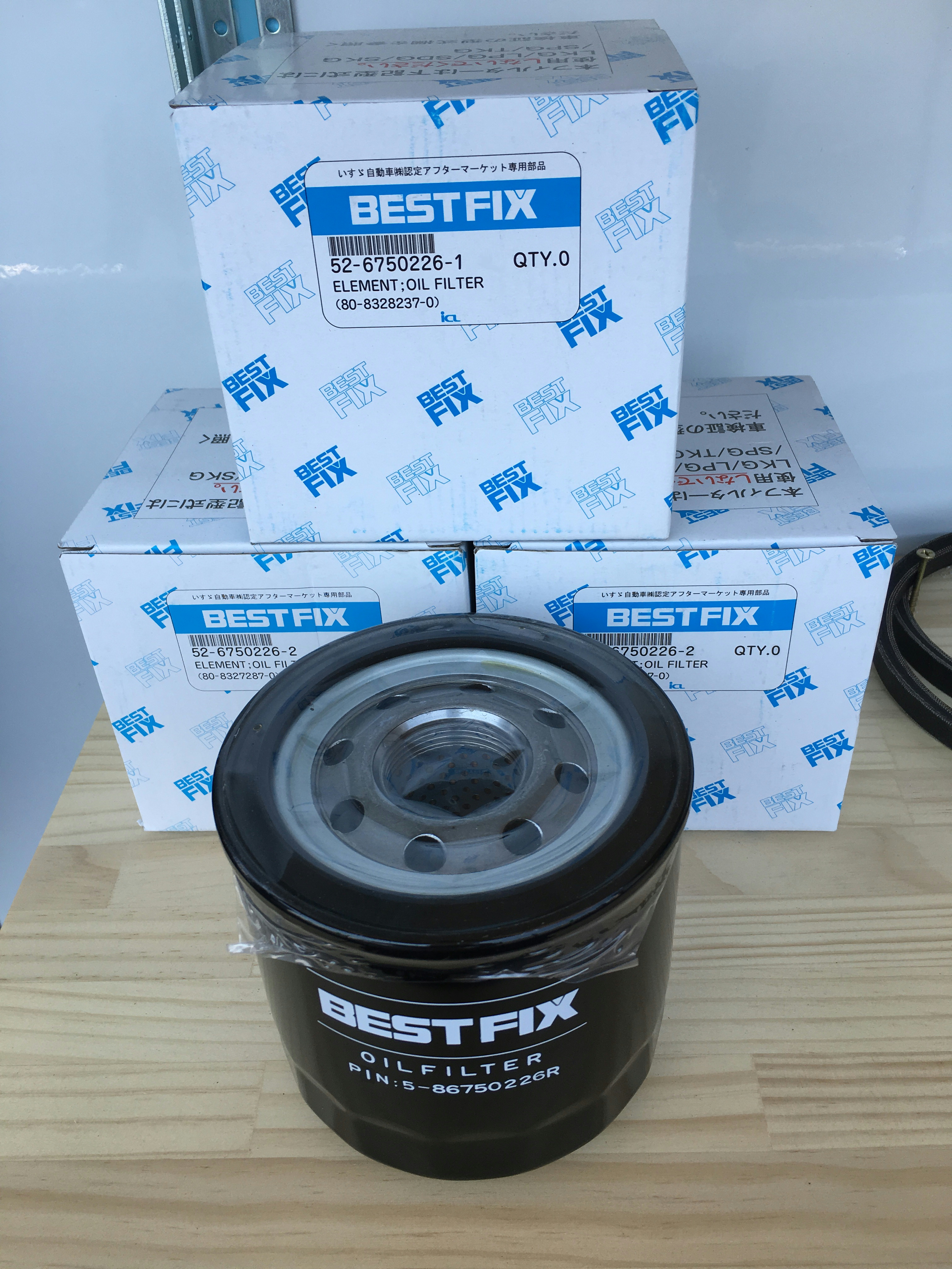 いすゞ自動車認定 アフターマーケット専用部品 BEST FIXブランドのオイルフィルター。